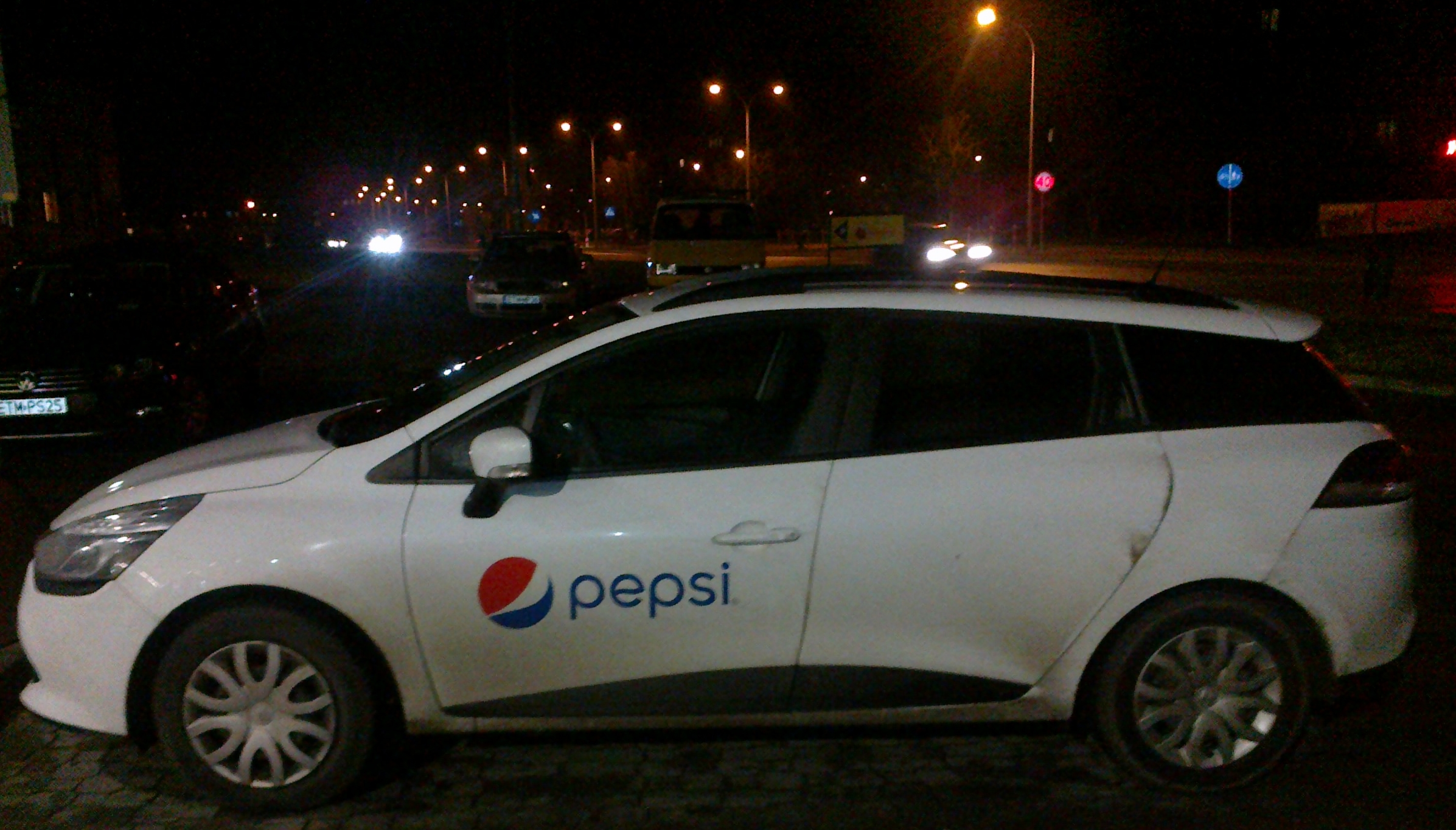 Samochód handlowca tomaszowskiej fabryki koncernu PepsiCo The canvasser's car of the factory PepsiCo from Tomaszow Mazowiecki